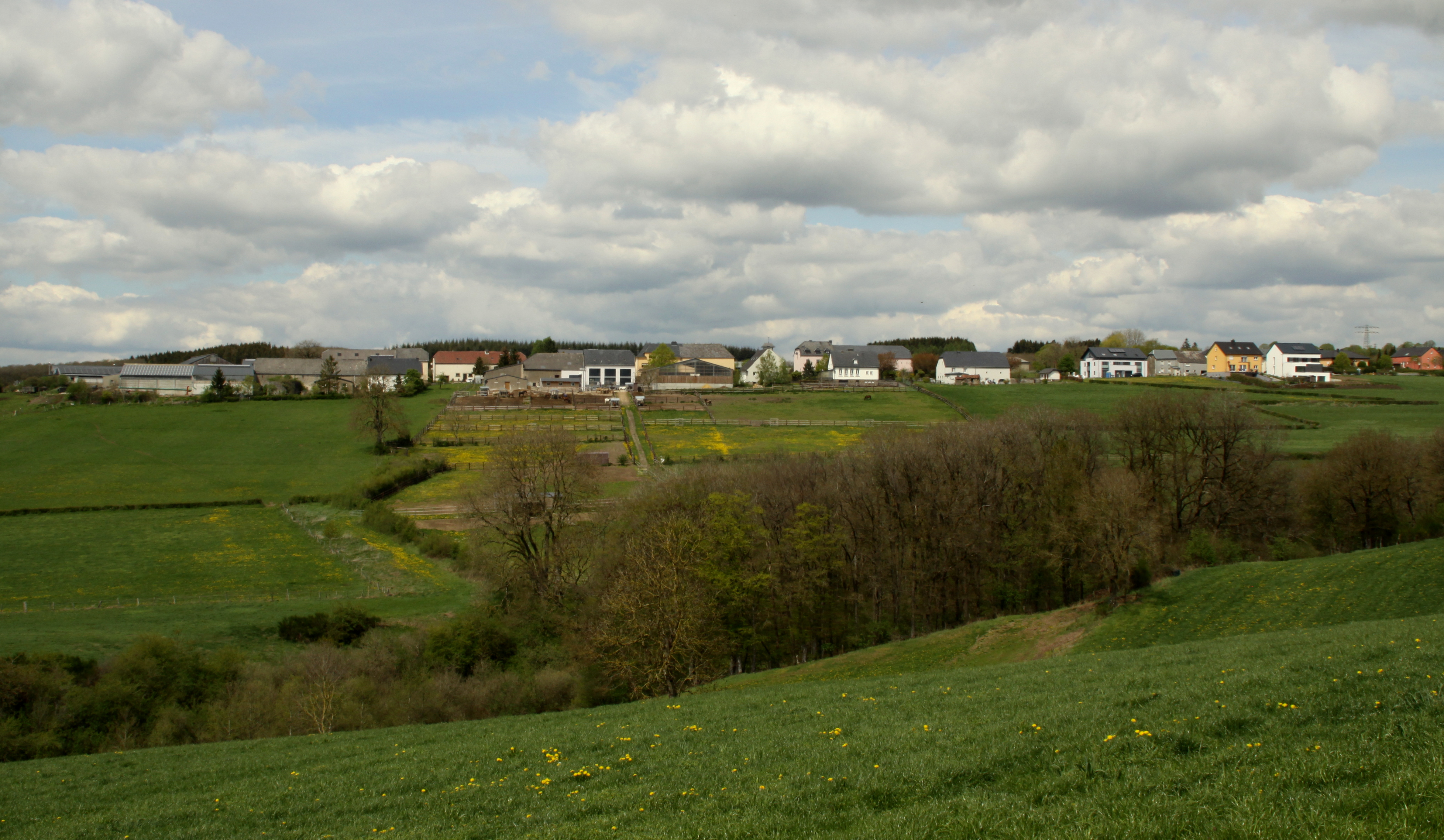 Duerscht vun Néidsen aus gesinn